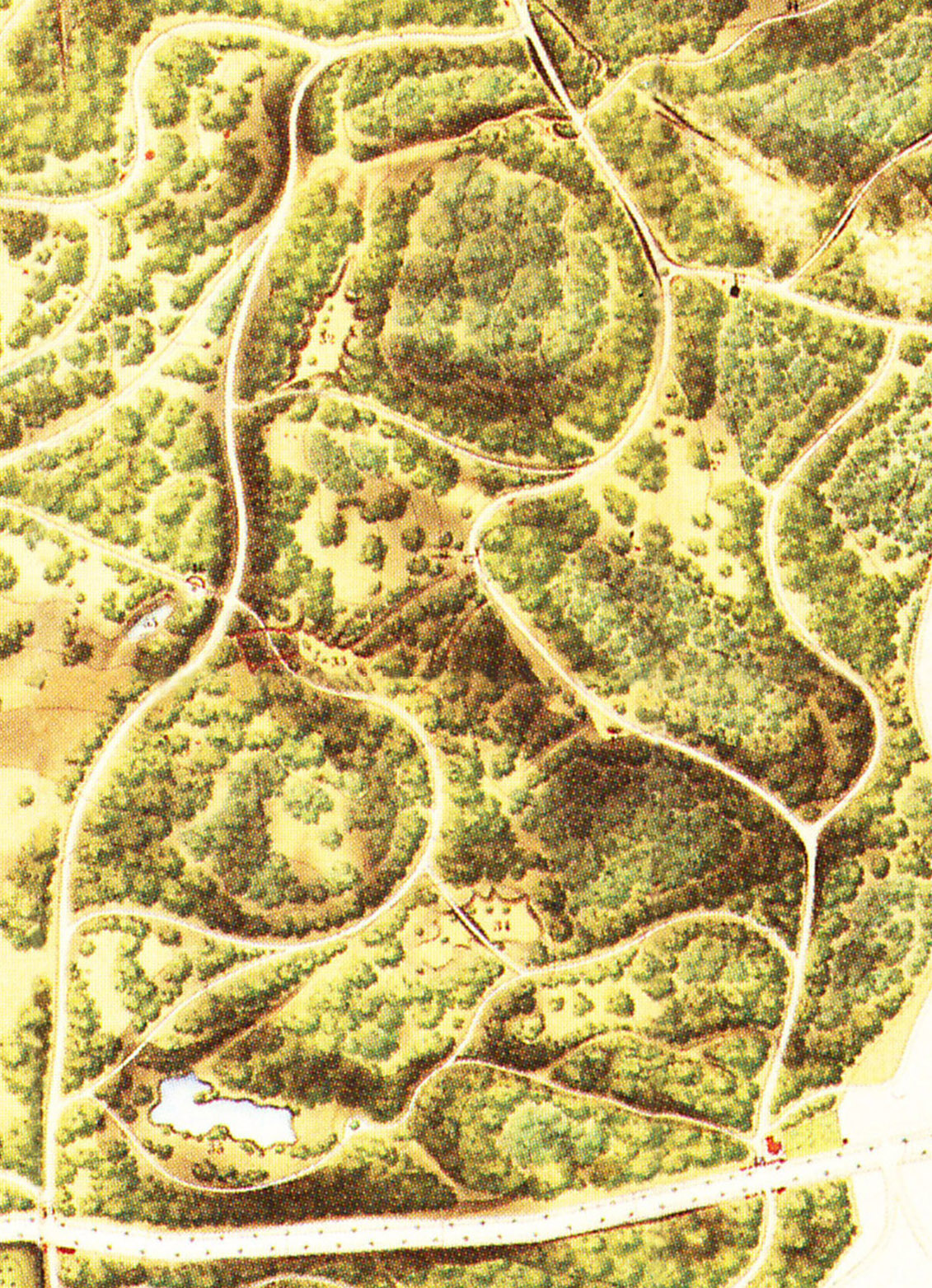 Kraatzplan 1862, Ausschnitt Waldtälerpartie